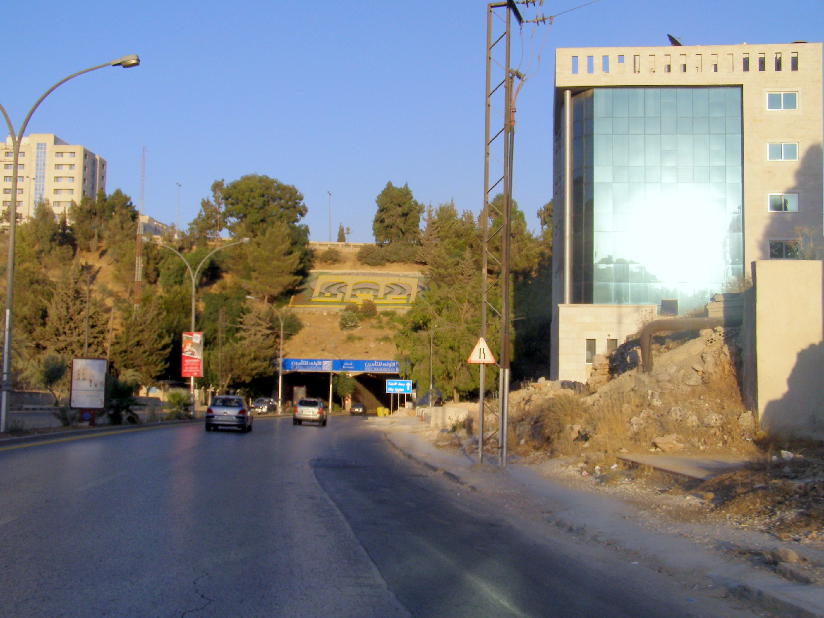 Arrar Street Amman شارع عرار (المعروف بوادي صقرة) في عمّان